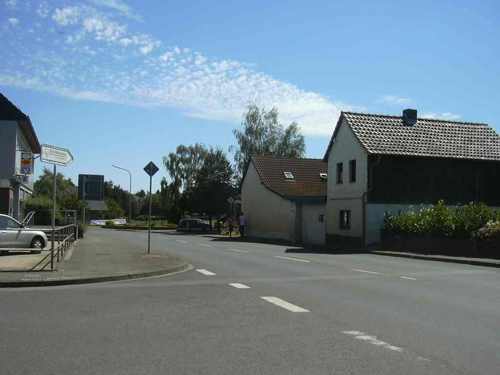 Dürscheven